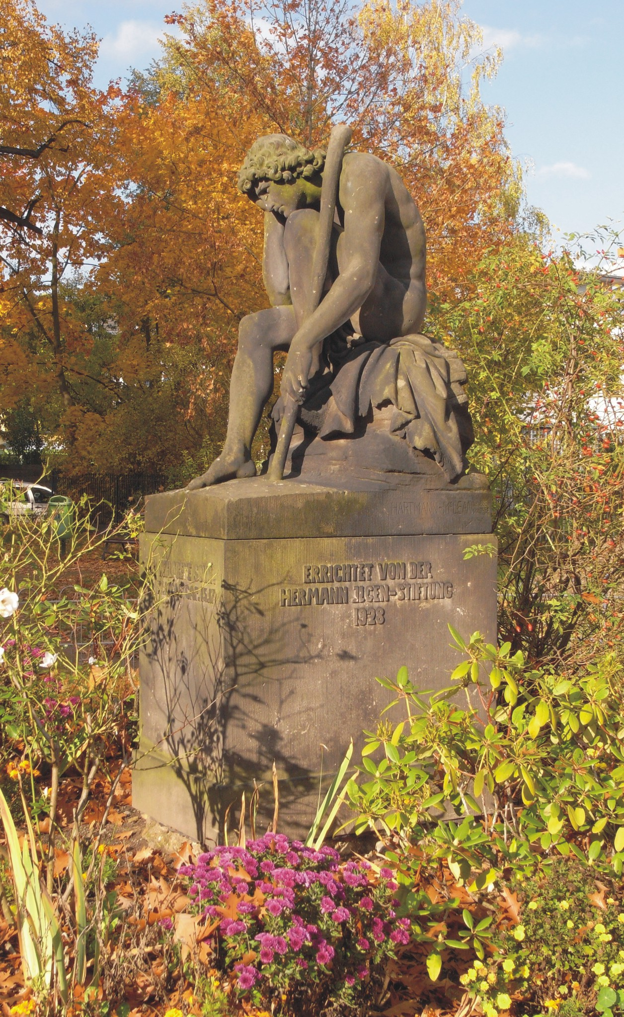 Plastik "Der verlorene Sohn" (1928) von Hans Hartmann-MacLean (1862-1946), Dresden-Blasewitz, Berggartenstraße, vor der Heilig-Geist-Kirche, finanziert von der Hermann-Ilgen-Stiftung